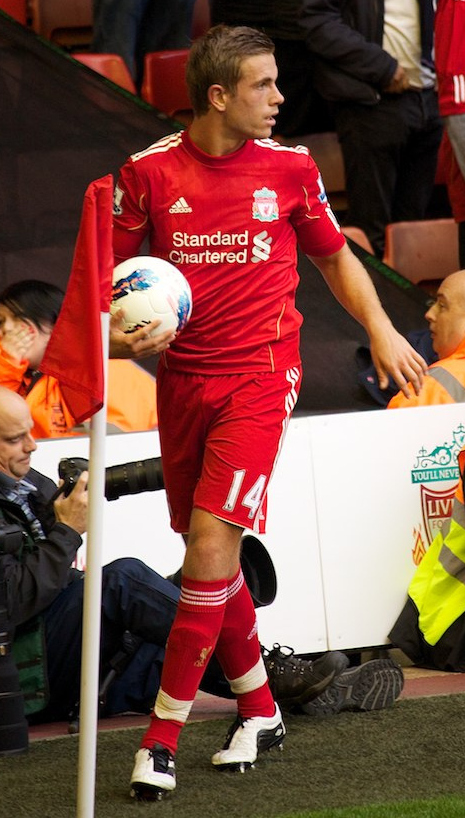 Liverpool vs Bolton 27/08/2011